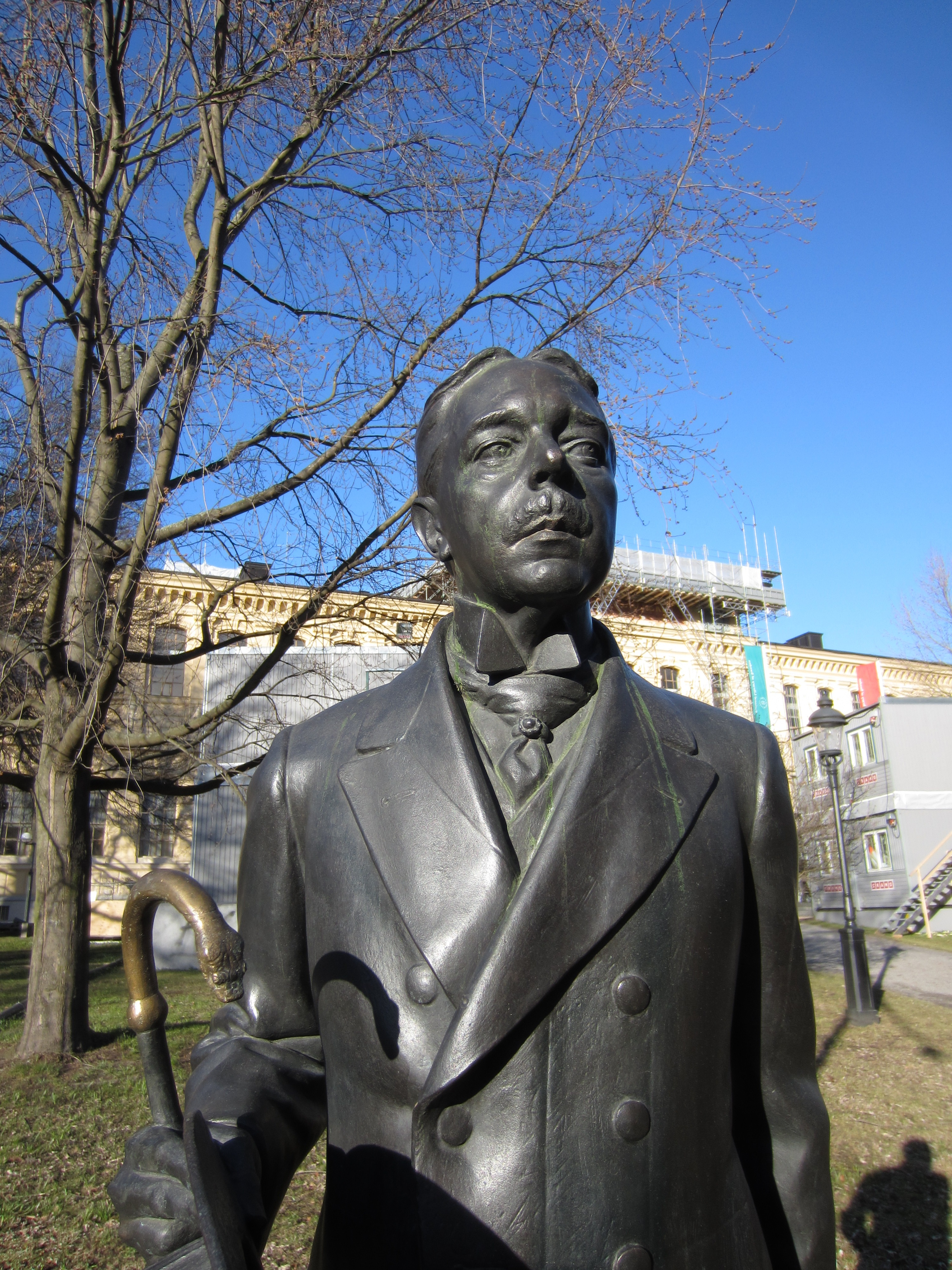 Staty av Hjalmar Söderberg utförd av skulptör Peter Linde 2010. Placerad framför Kungliga biblioteket i Humlegården, Stockholm.